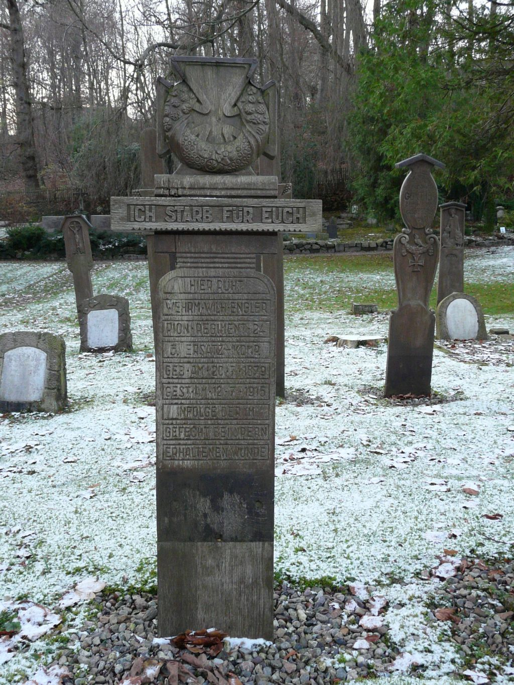 Grabmäler von Karl Spethmann (1888-1958) für gefallene Soldaten des Ersten Weltkriegs auf dem alten Garnisonfriedhof in Schleswig